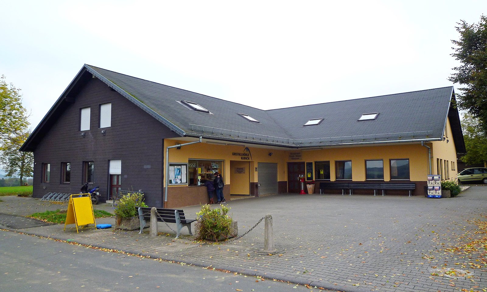 Kubacher Kristallhöhle